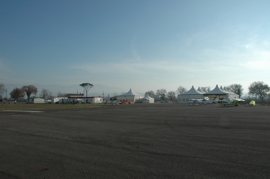 Aviosuperficie di Terni "Alvaro Leonardi"